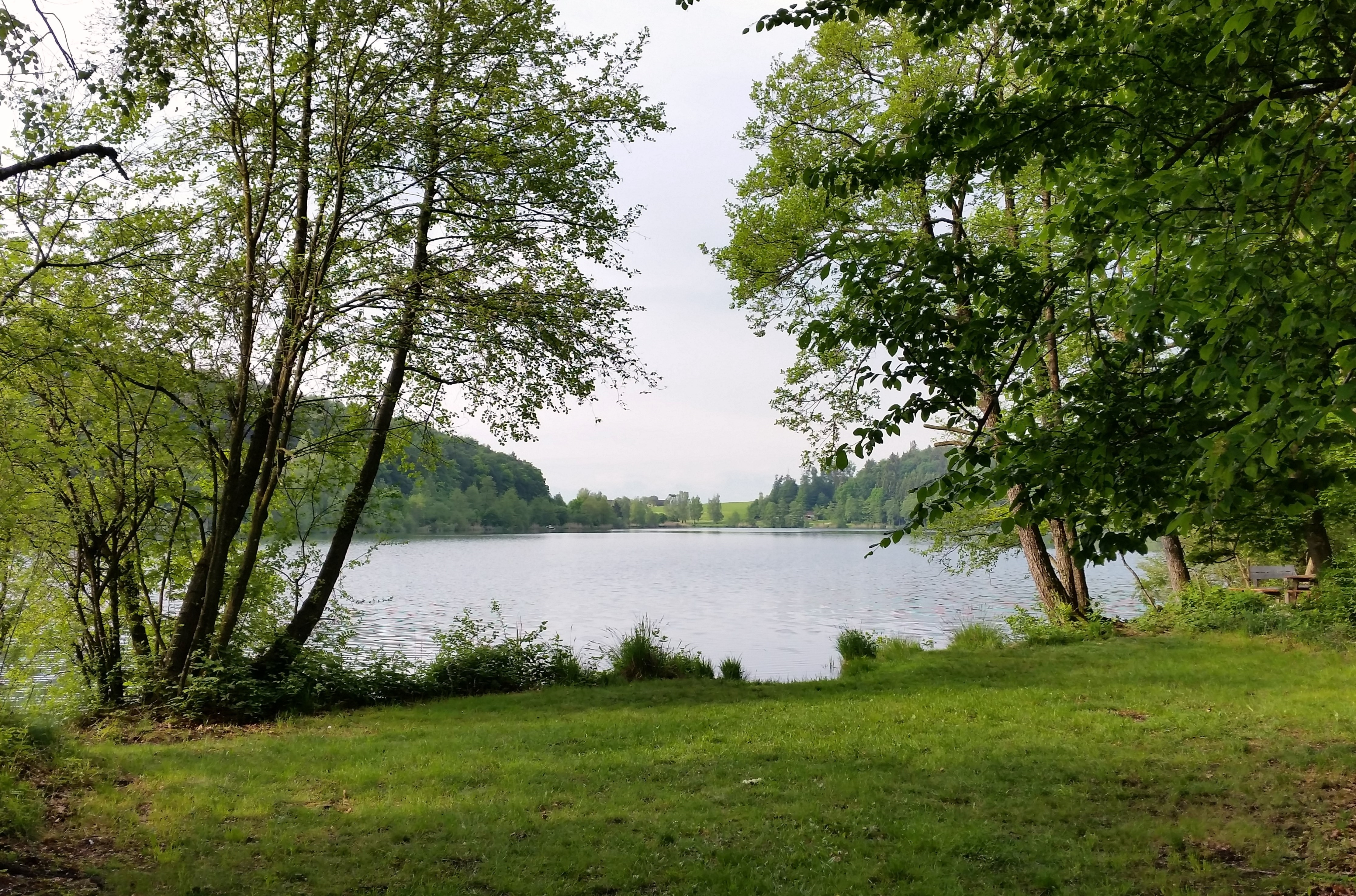 Höllerersee This media shows the nature reserve in Upper Austria with the ID n002.